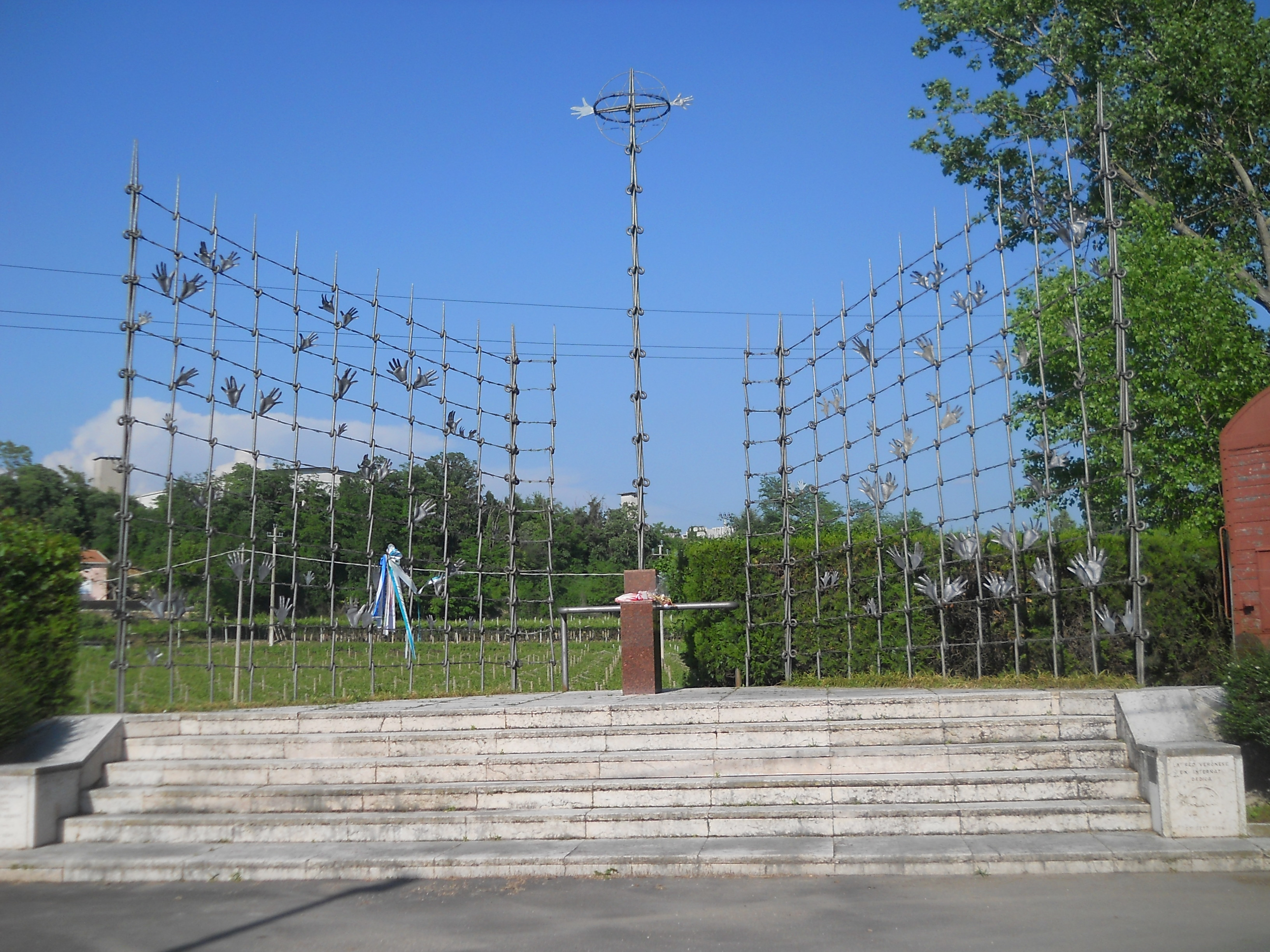 Monumento agli ex internati di Pescantina (provincia di Verona)